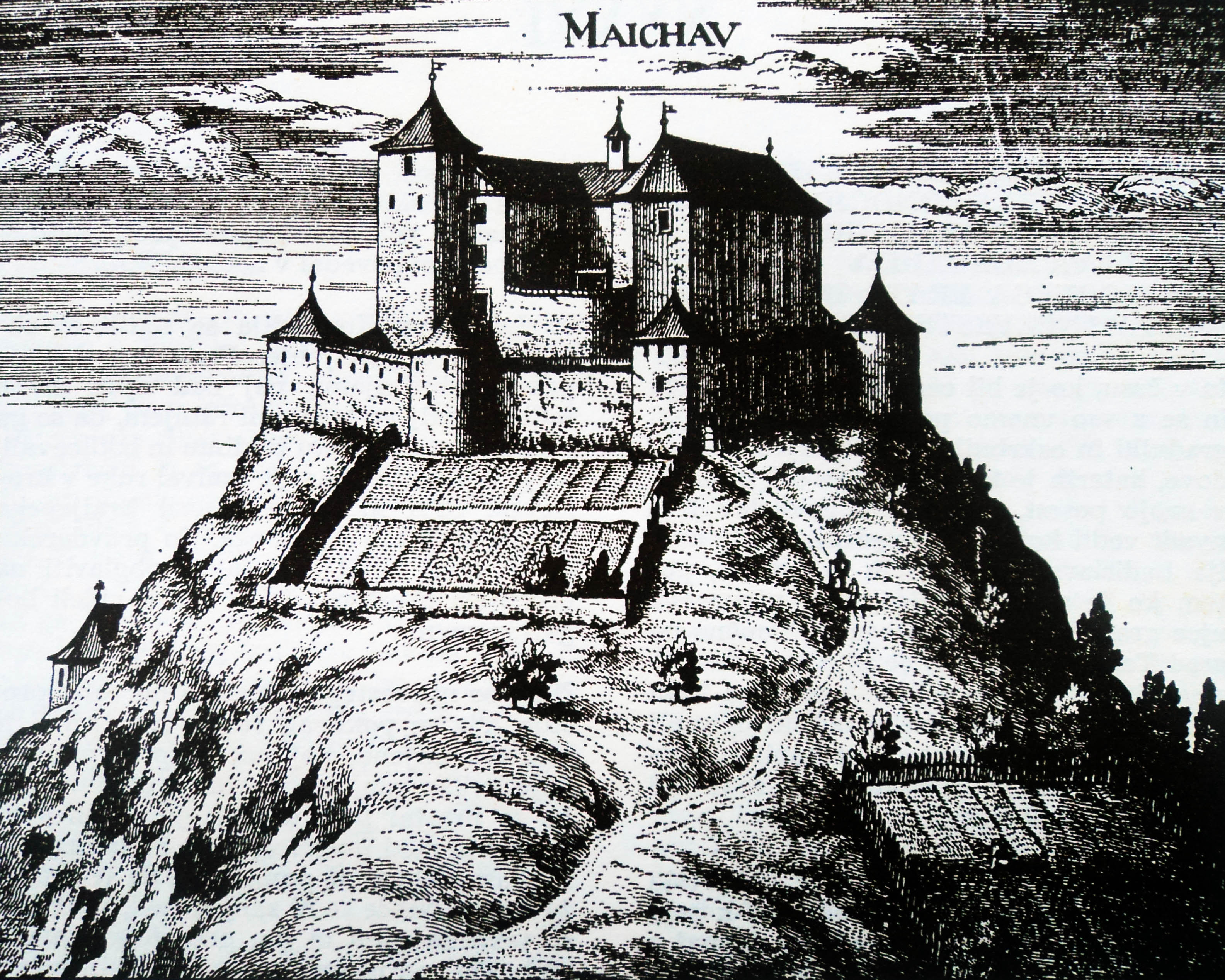 Grad Mehovo na Valvasorjevi upodobitvi leta 1679